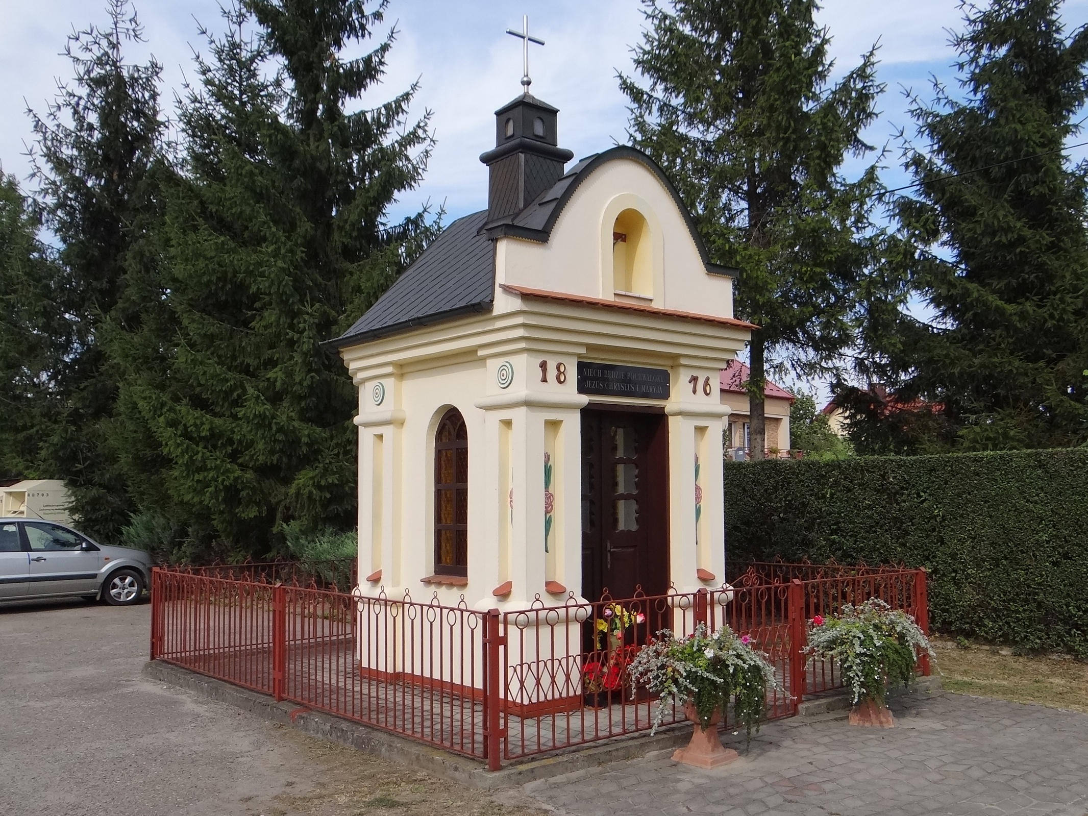 Biskupice Radłowskie